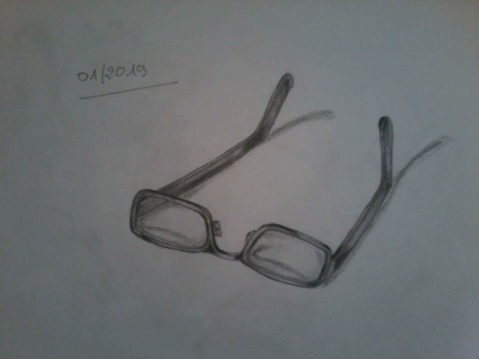 رسمة لنطرة طبية بالقلم الرصاص